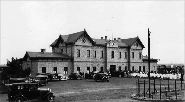 Vista un poco más moderna por razón de los arbustos más grandes a la izquierda (2). Los autos y los chicos esperando sugieren que ésta es una ocasión especial en la década 30